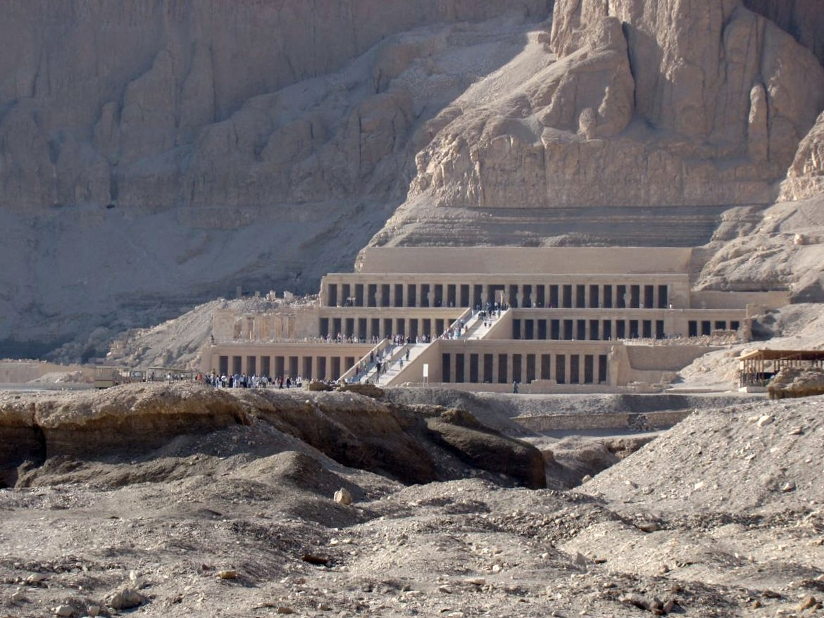 Храм Хатшепсут